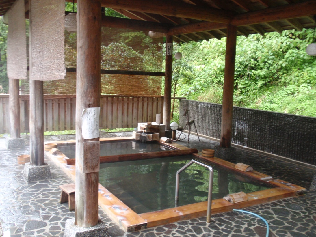 新潟県十日市町市松之山温泉、ひなの宿千歳の露天風呂。